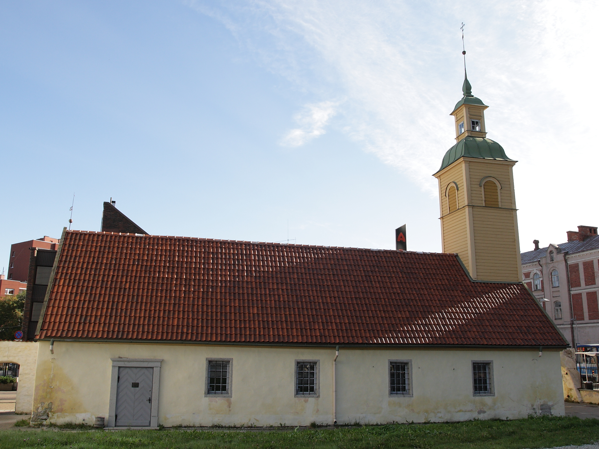 Tallinna Jaani Seegi kirik, 14. saj, 1648, 18. saj